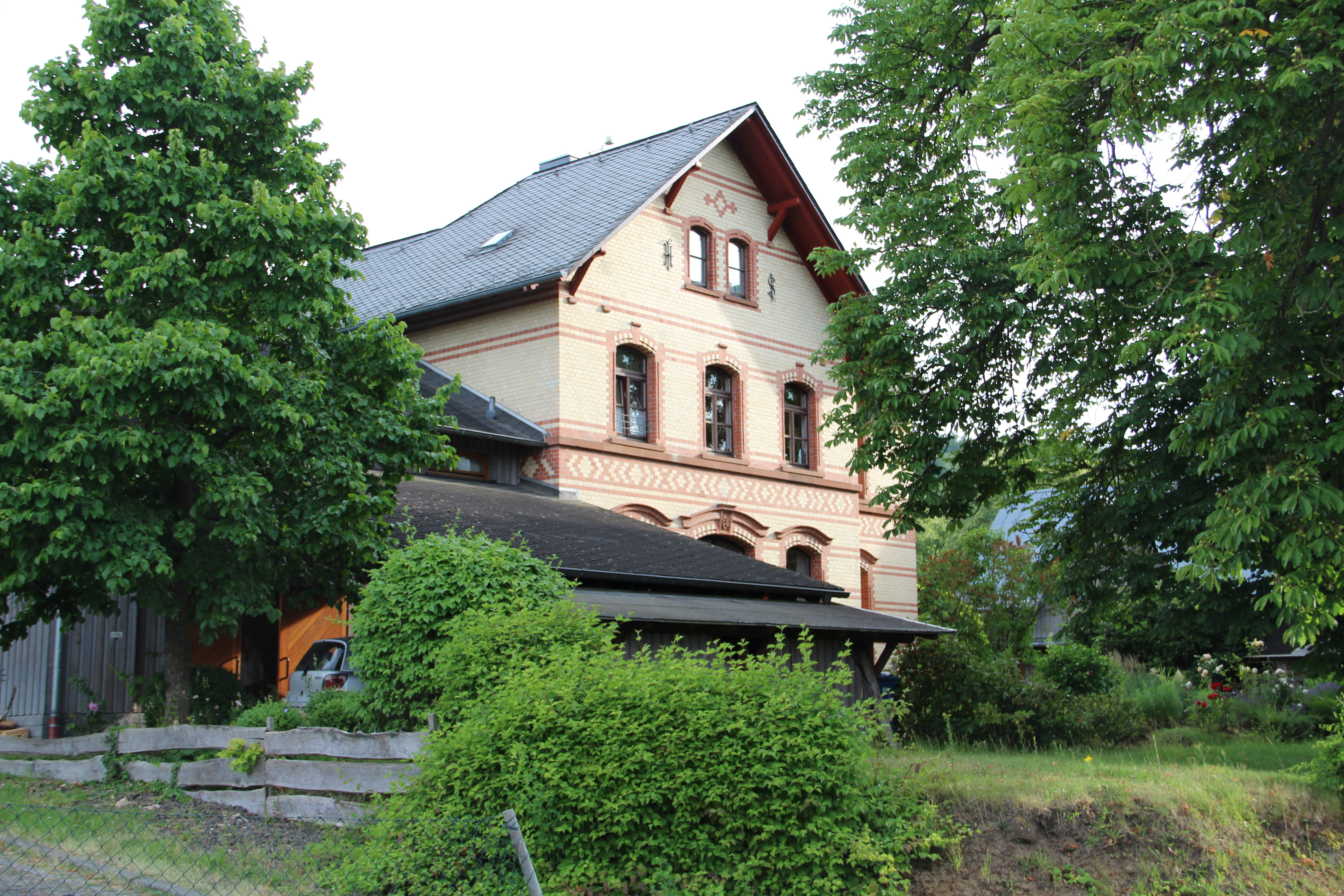 Ehem. Bahnhof der Lumdatalbahn